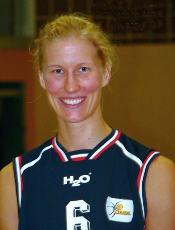 Tini Ishaque, Basketballnationalspielerin